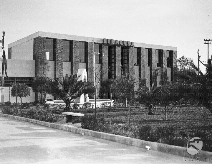 Inaugurazione dell'VIII Fiera campionaria di Tripoli alla presenza di Italo Balbo - Il padiglione della Fiera dedicato alla città di Siracusa